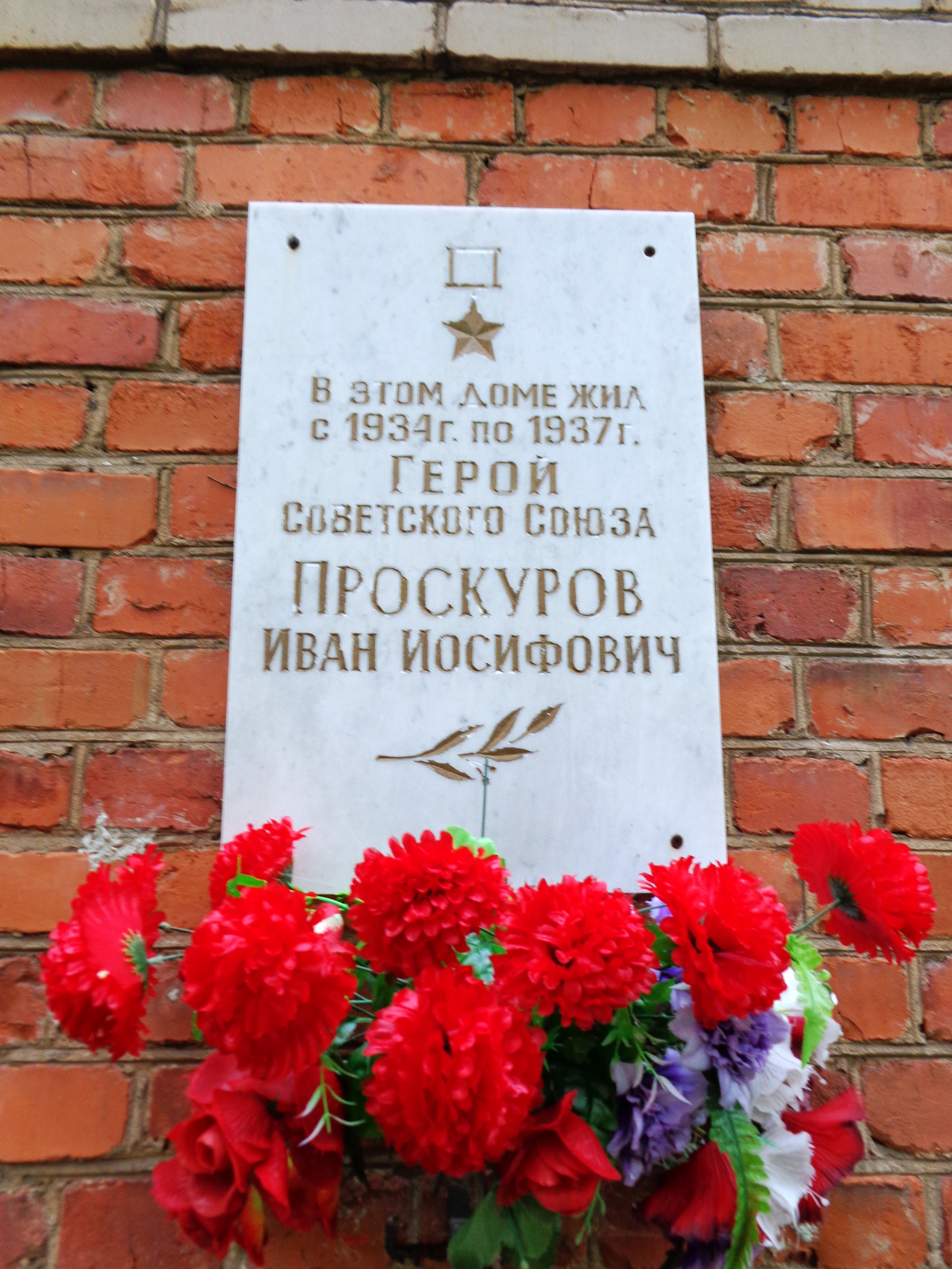 Мемориальная доска на доме в поселке Монино Московской области, где проживал Герой Советского Союза И.И. Проскуров